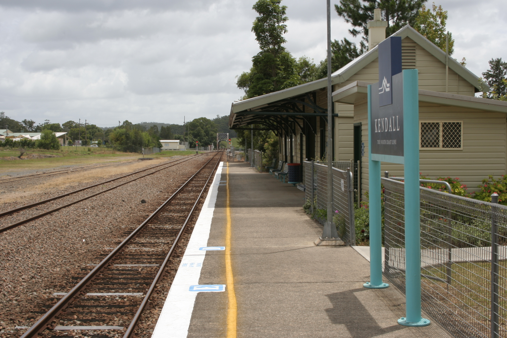 Kendall Station